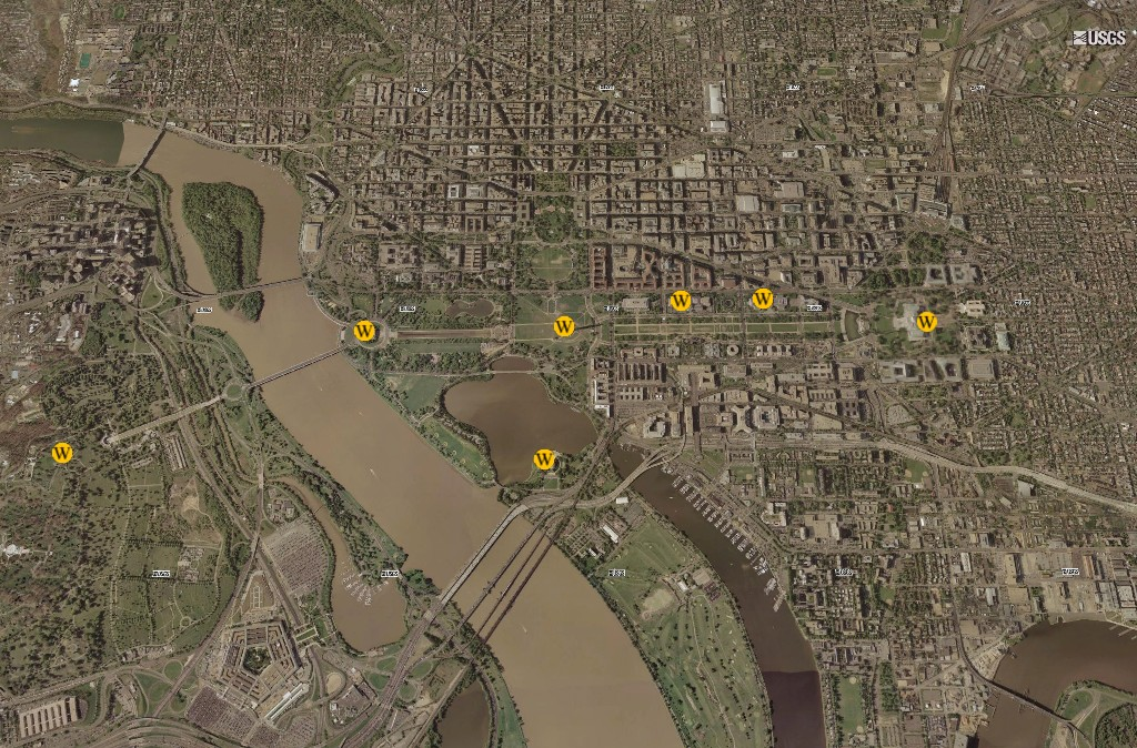 Waszyngton - widok w programie NASA World Wind; zaznaczone miejsca z linkami do Wikipedii